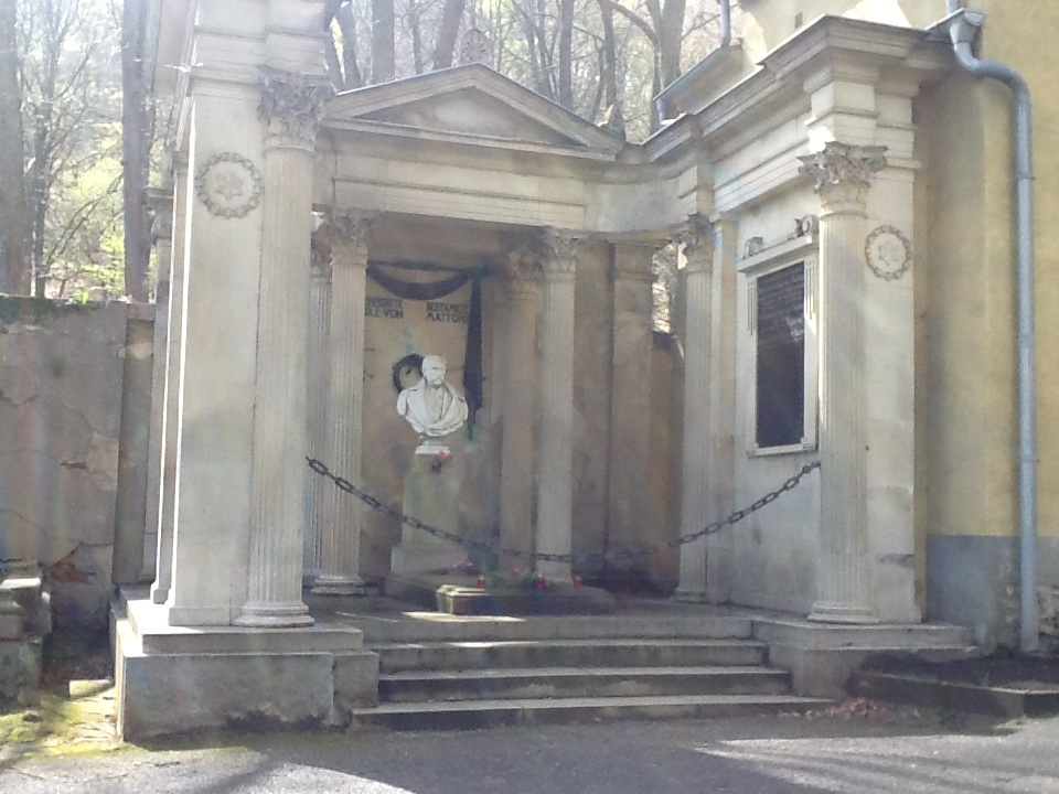 Hrob Mattoniho 2014